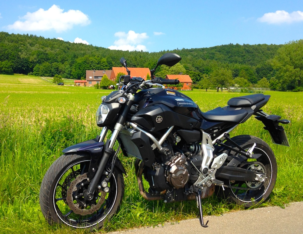 Darstellung eines Motorrades des Typs Yamaha MT-07 vor einer Wiese